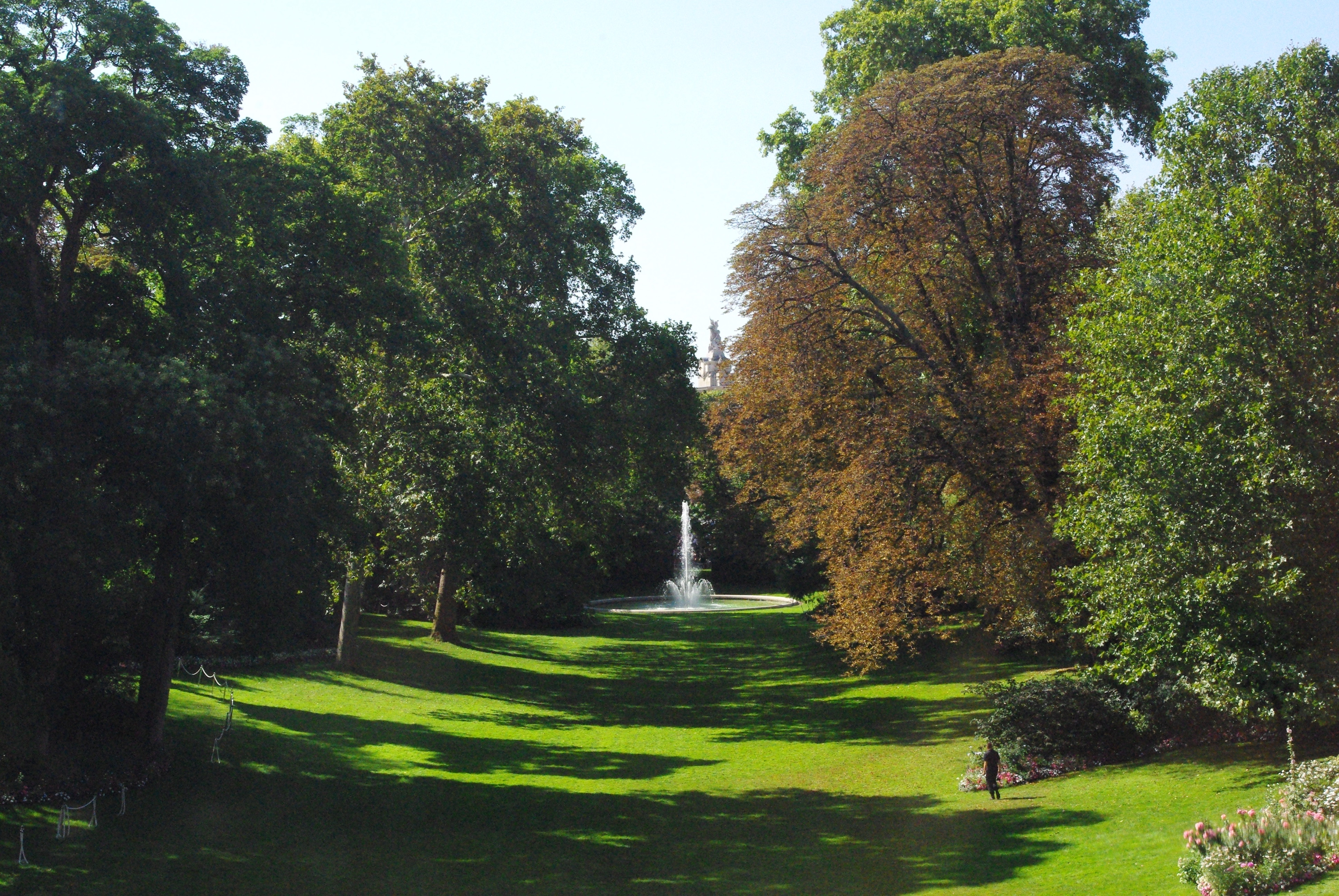 Vue des jardins du palais de l'Élysée depuis le Salon Dorée